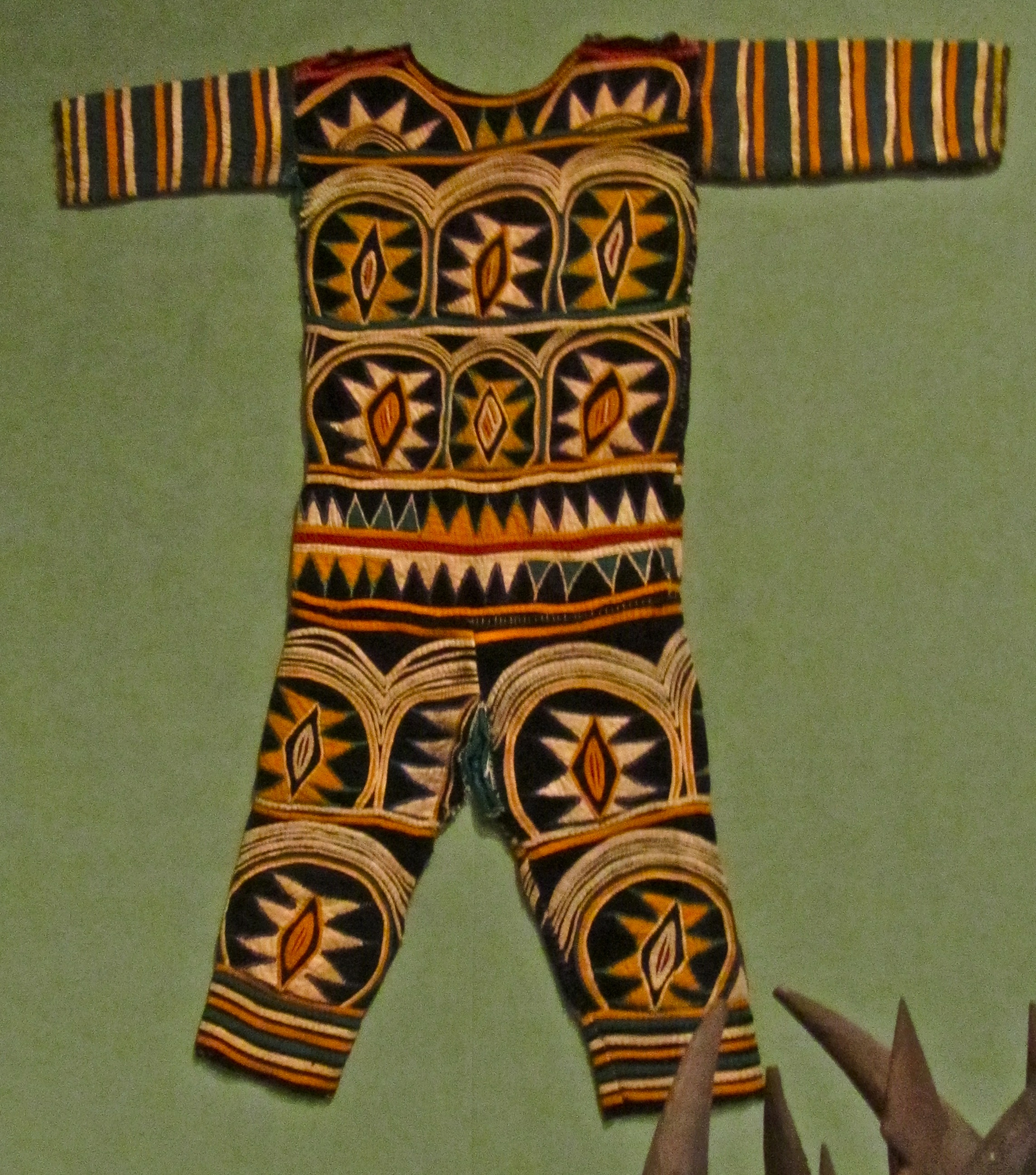 Igbo people Nigeria cotton 1950-1975